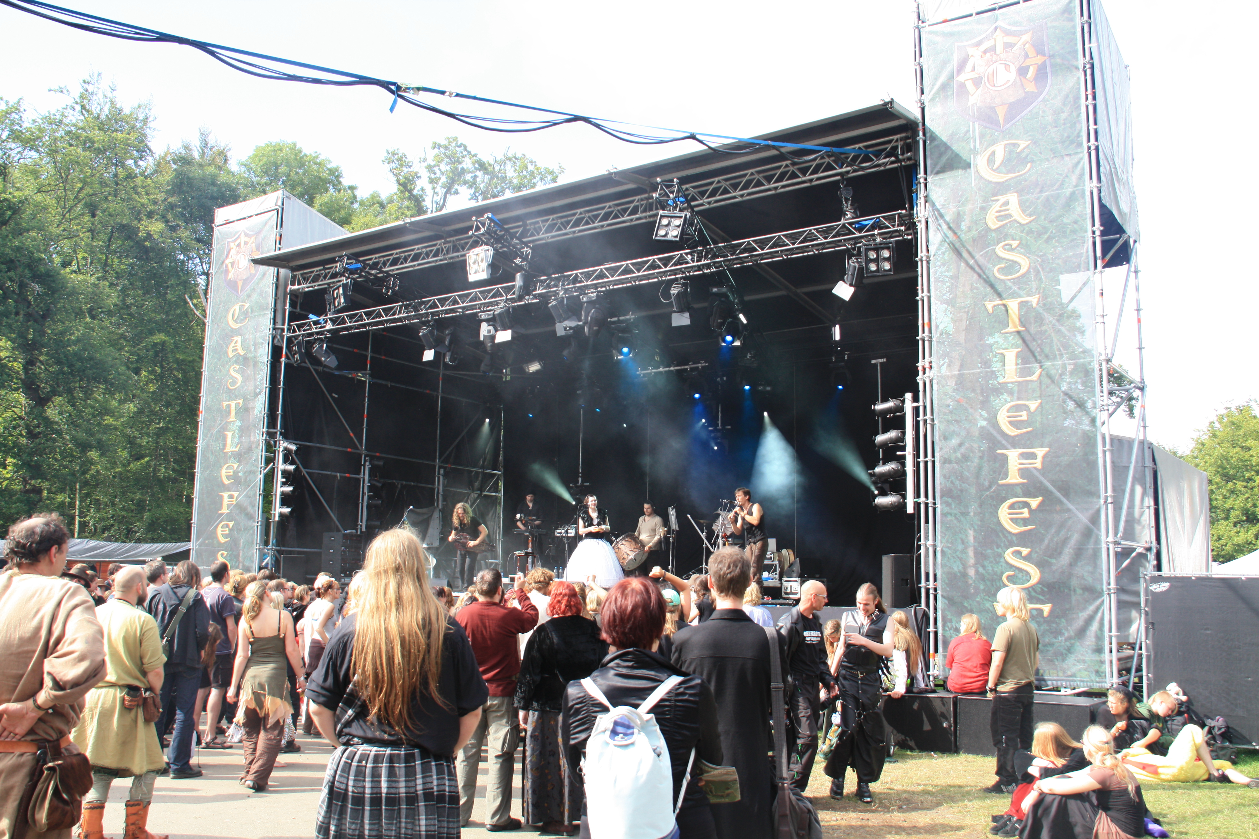 Valravn op Castlefest 2009